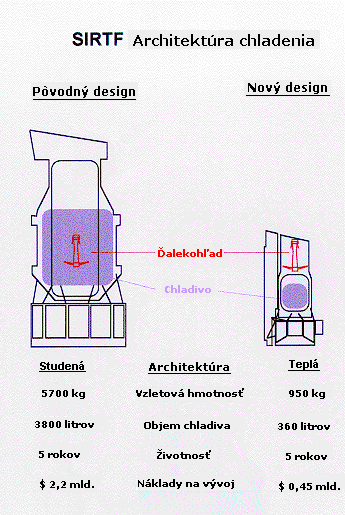 Kryogénna architektúra SIRTFu